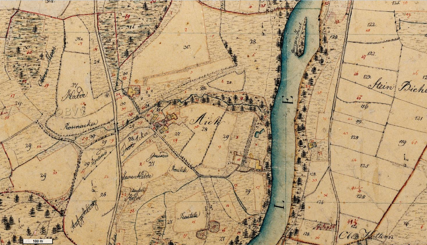 erste Flurkarte, Landesaufnahme